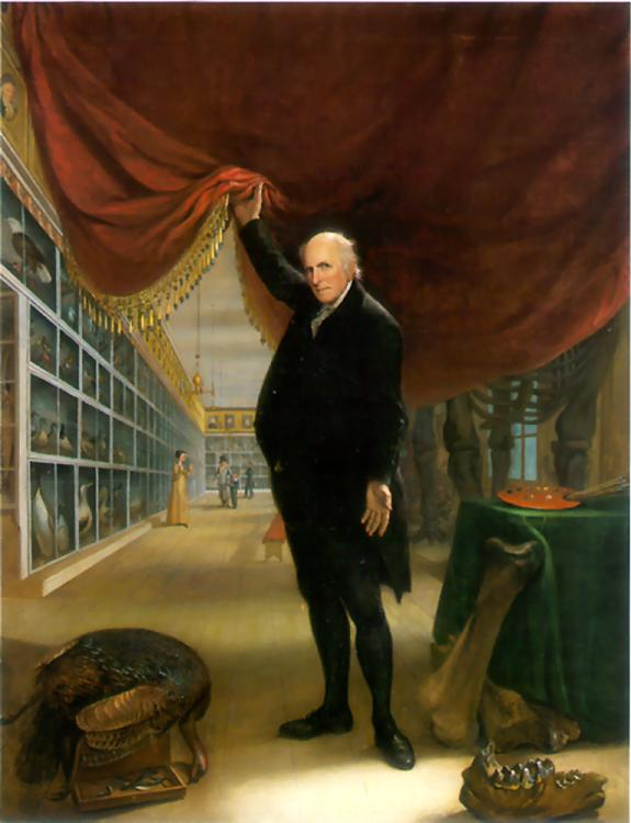 Self-portrait